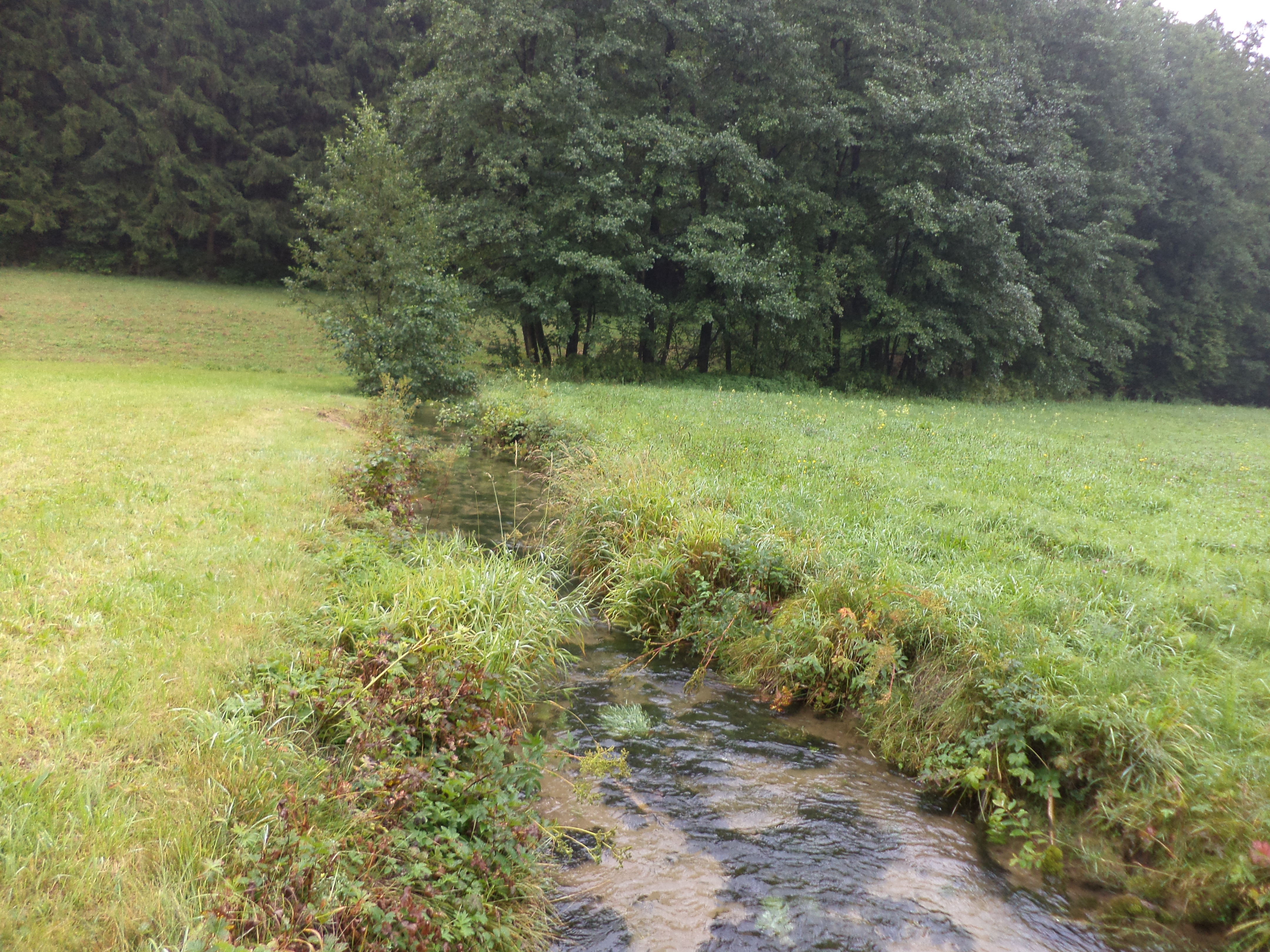 Der abfließende Bach des Weihersbrunnens bei Alladorf